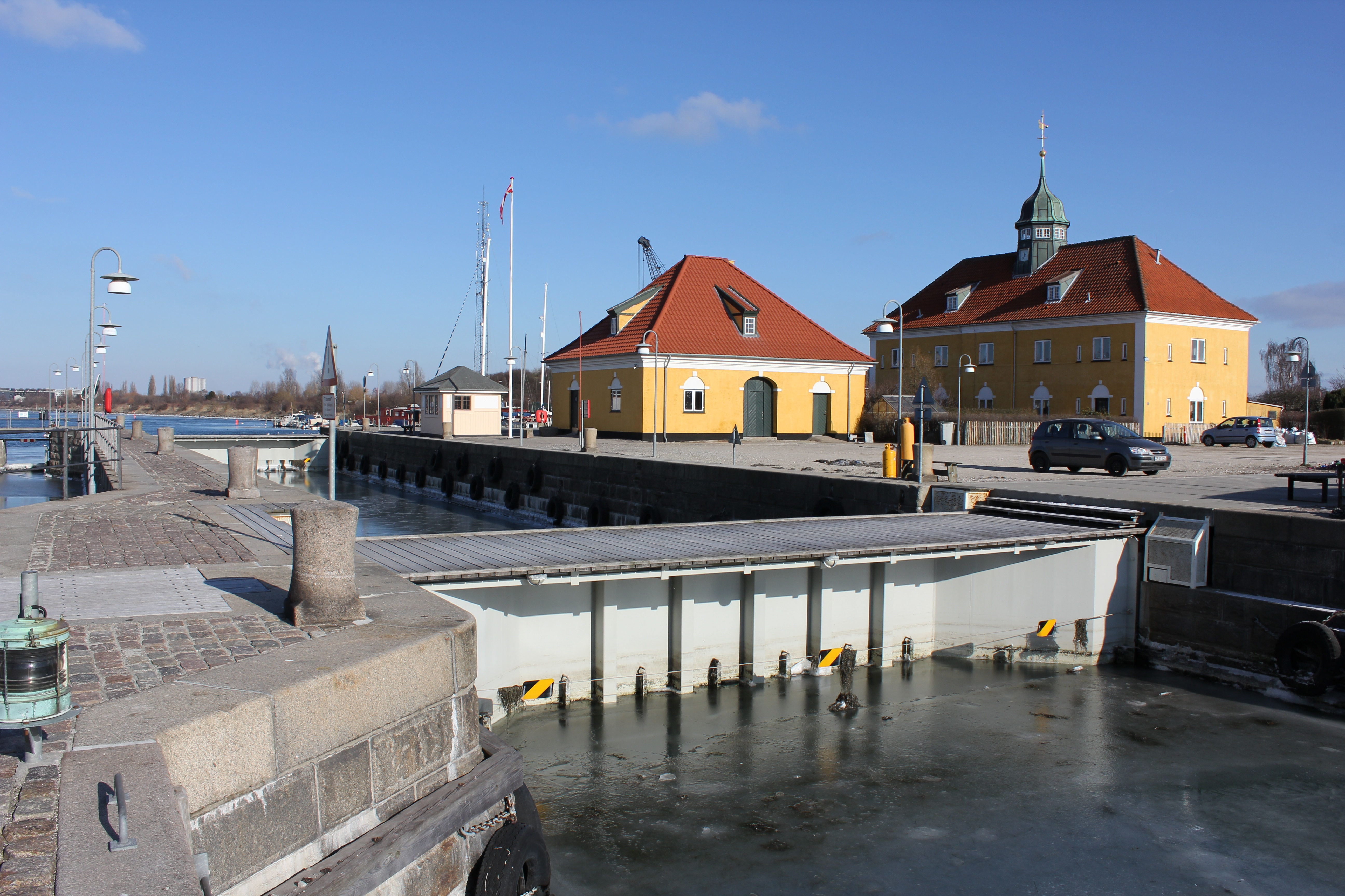 Slusen på Sluseholmen i København